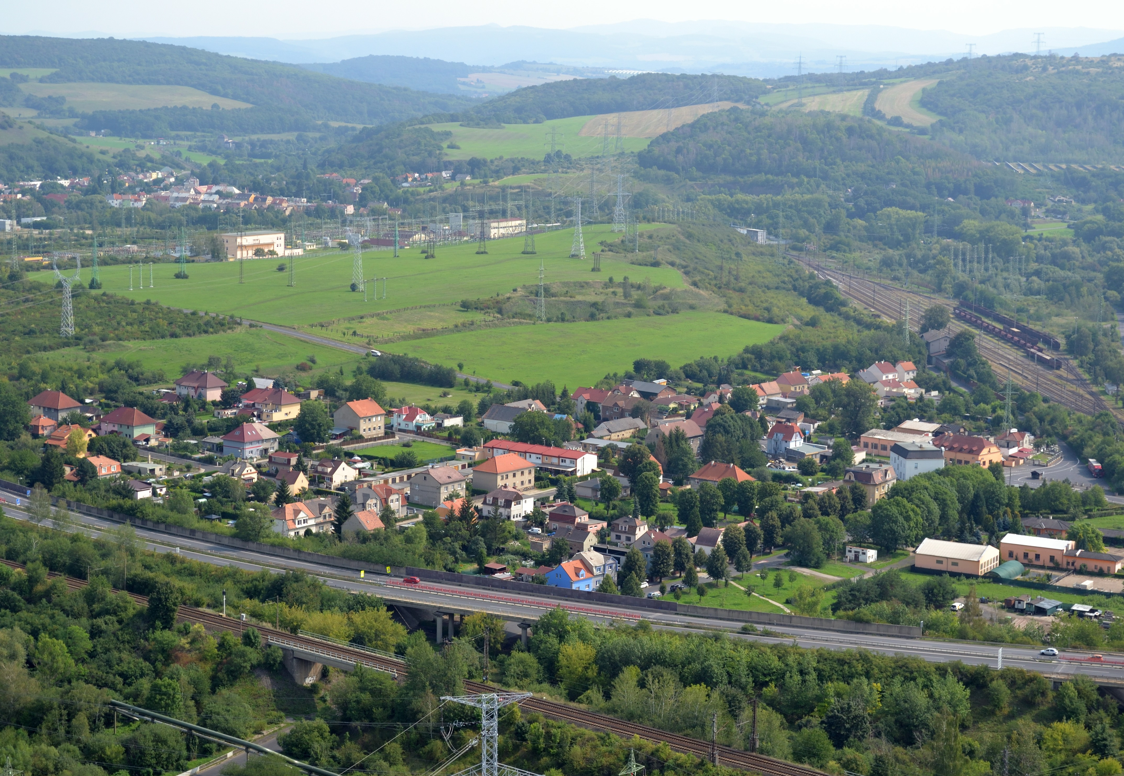 Chotějovice - pohled z vyhlídky elektrárny Ledvice